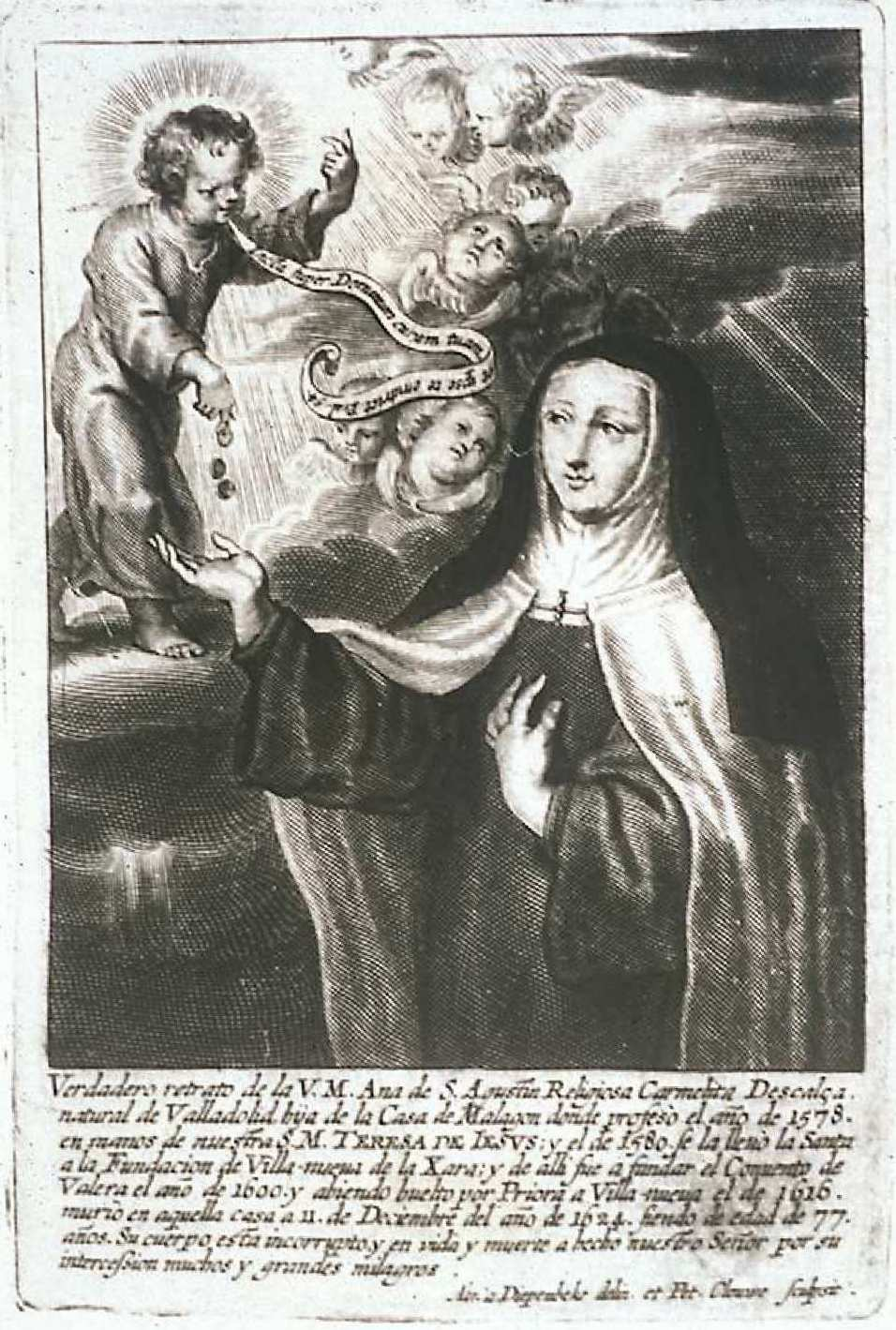 "Verdadero retrato de la V. M. Ana de S. Agustín Religiosa Carmelita Descalça natural de Valladolid". Abr. a Diepenbek delin et Pet. Clouvet sculpsit. Ilustración de Alonso De San Jerónimo, Vida de Ana de San Agustín. Madrid, 1668. Biblioteca Nacional de España